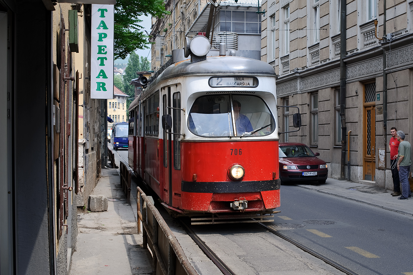 schaut aus wie die alten trams in wien...